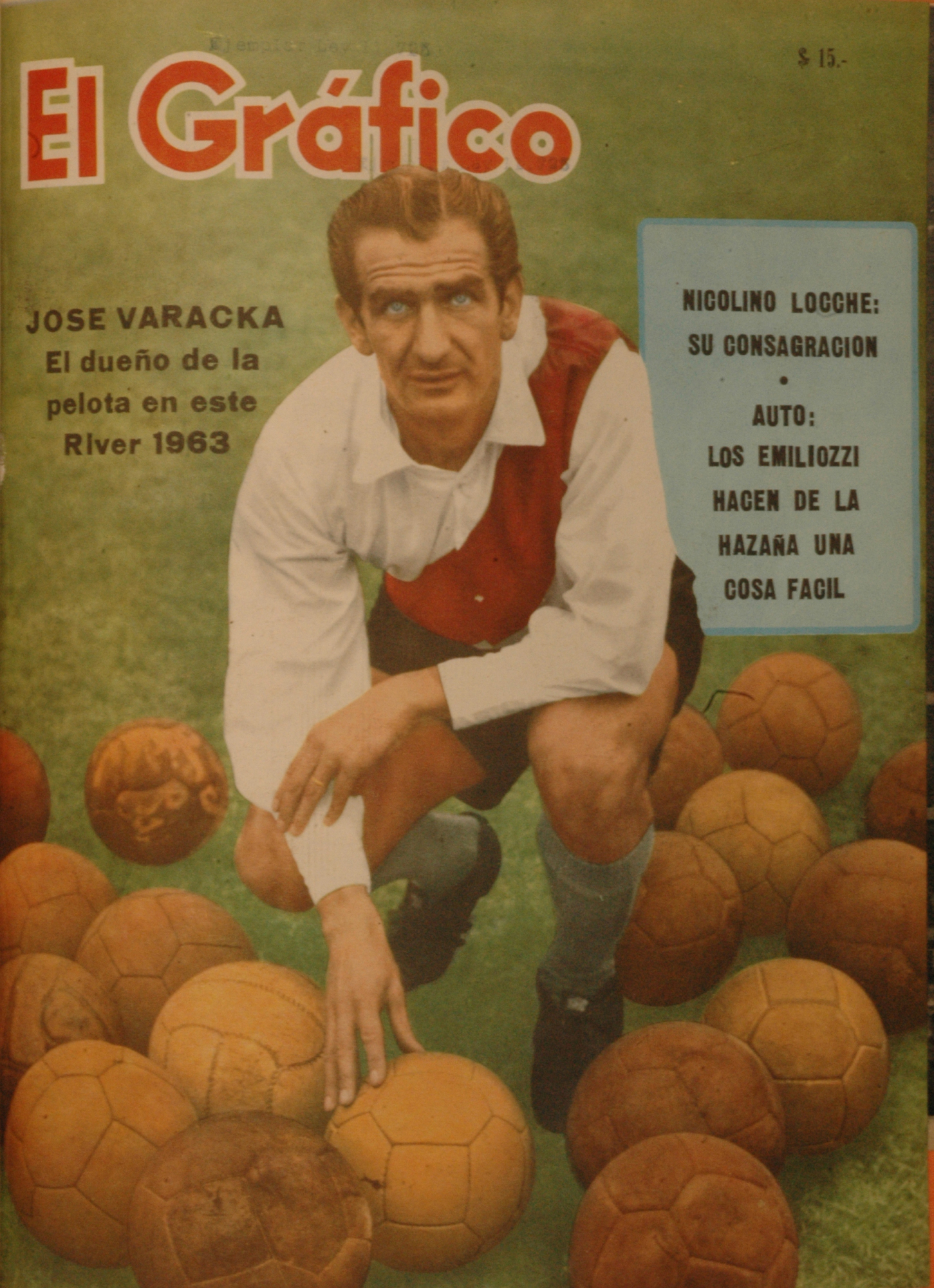 El Grafico del 03 de Julio de 1963. Edicion 2282